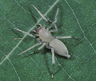 female Clubiona viridula from Okinawa.